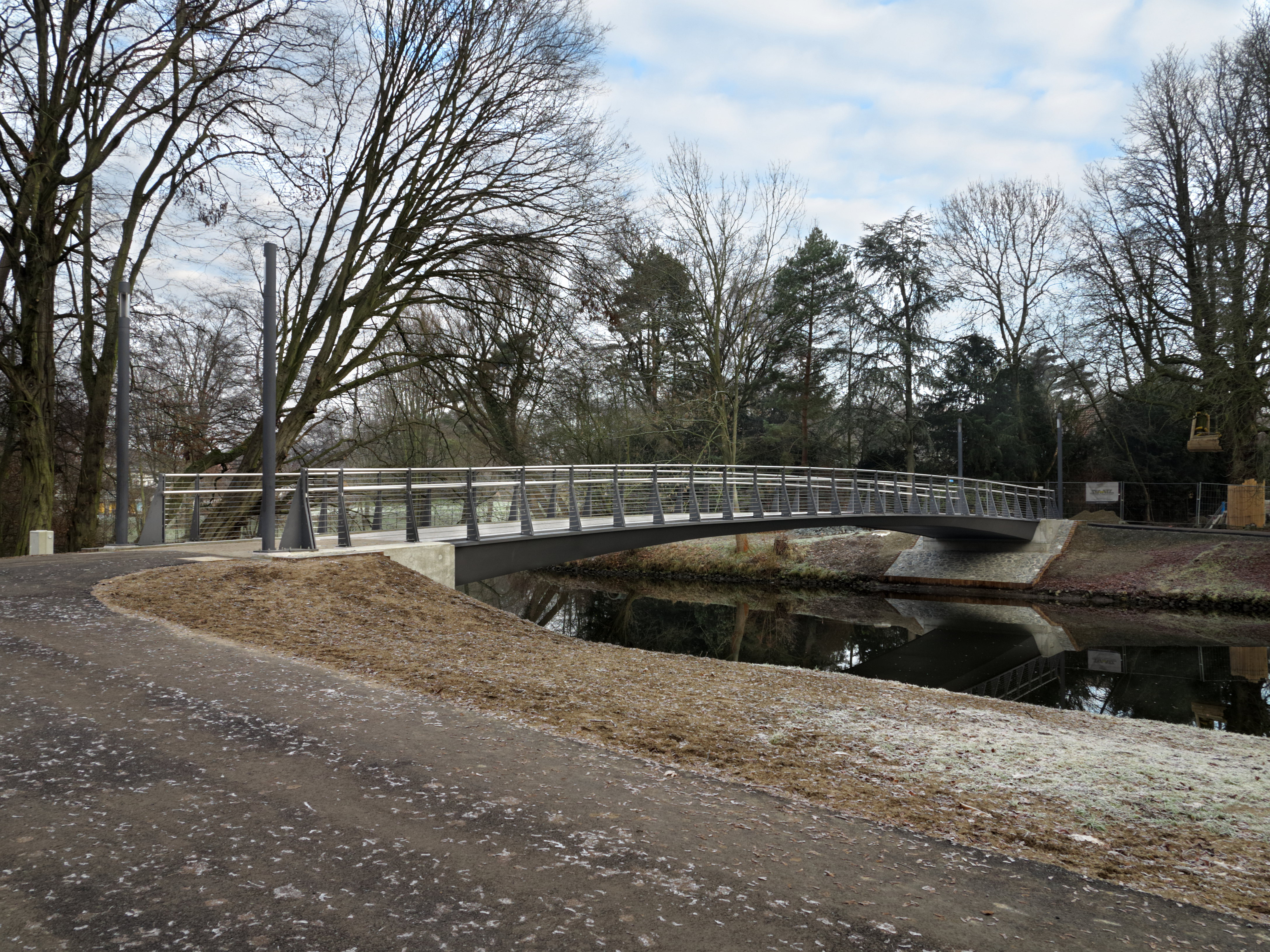 Braunschweig: die 2016 neu erbaute Hennebergbrücke im Bürgerpark